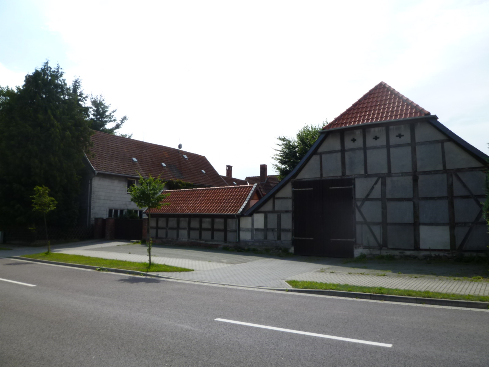 Herzoglische Försterei, Gebäudekomplexe, Calvörde 2011